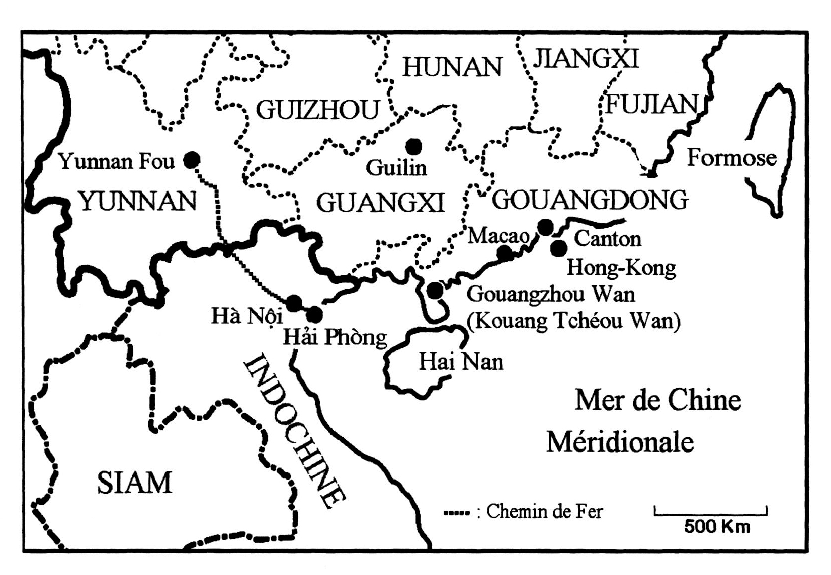 Chine et Indochine dans les années 1930.